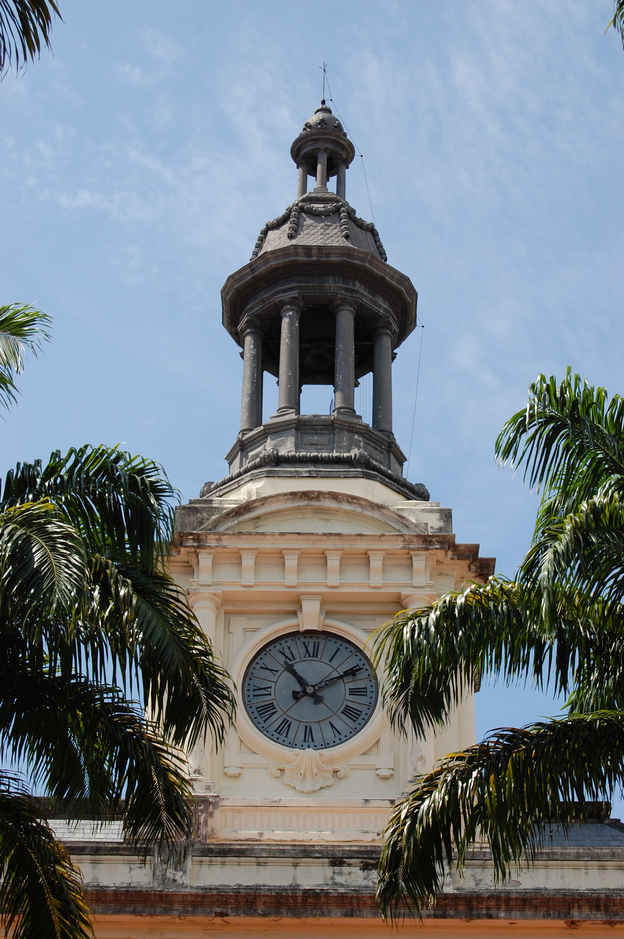 Interior do edifício da Faculdade de Direito da Universidade Federal de Pernambuco.